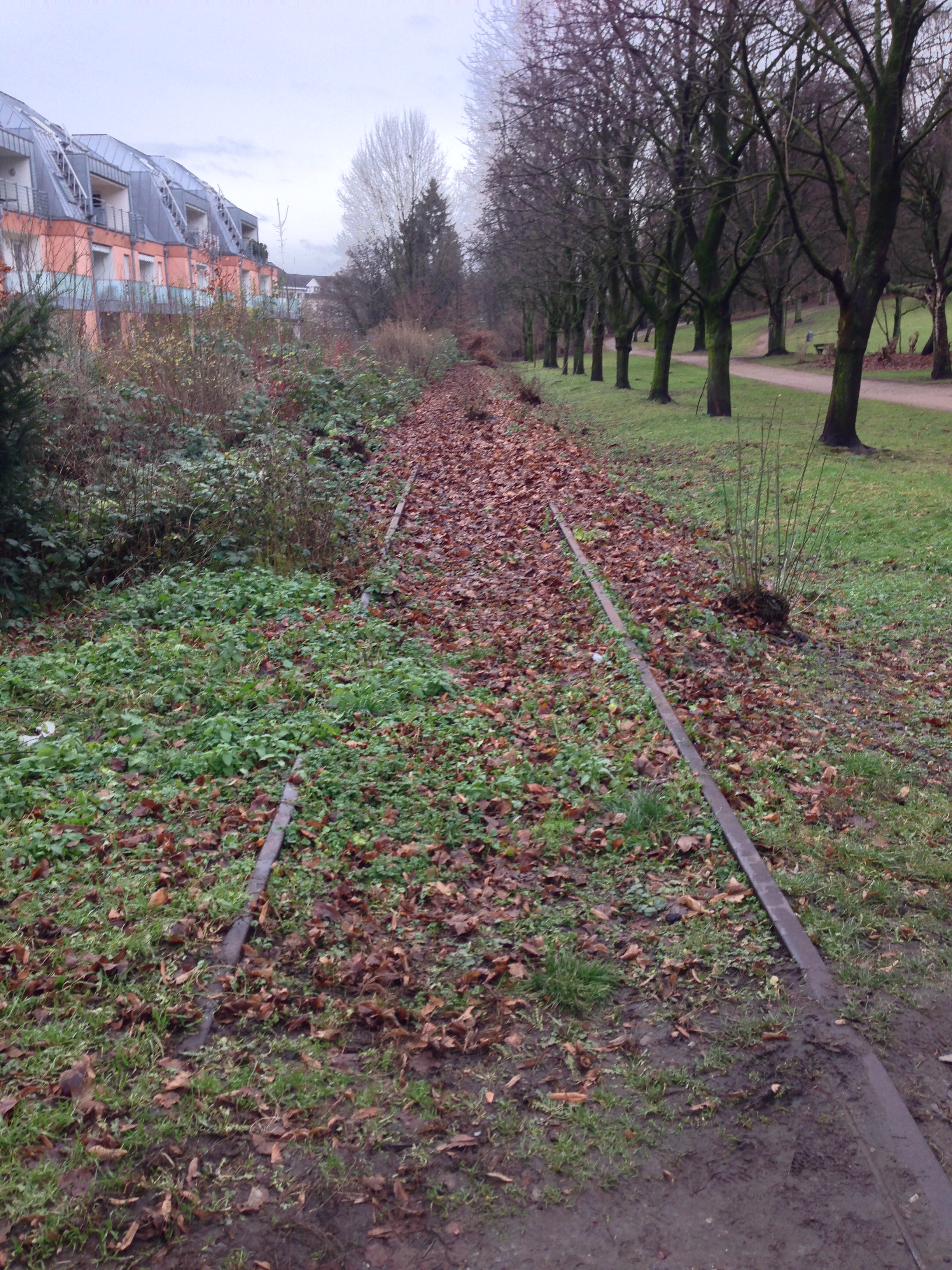 Gleisrest der Aggertalbahn im Stadtgebiet Siegburg am Fuß des Michaelsberg.